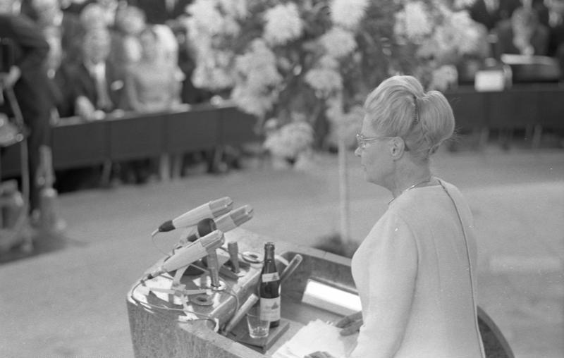 Verleihung des Friedenspreis des Börsenvereins des Deutschen Buchhandels an Gunner und Alva Myrdal (Schweden) in Anwesenheit von Bundespräsident Heinemann in der Frankfurter Paulskirche